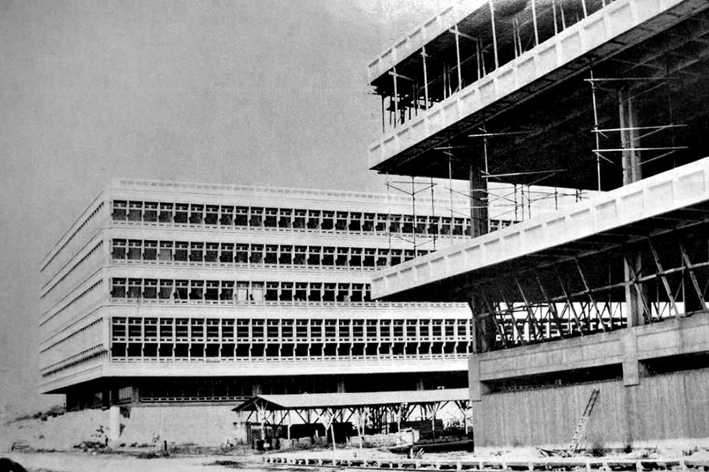 Vista de la Ciudad Universitaria de la Universidad de Buenos Aires aún en construcción, desde la costa del Río de la Plata y hacia el sudeste. En primer plano, a la derecha, se ve la estructura del Pabellón III (Facultad de Arquitectura y Urbanismo) y hacia el fondo a la izquierda, el Pabellón II (Facultad de Ciencias Exactas y Naturales) ya habilitado. Buenos Aires, Argentina.